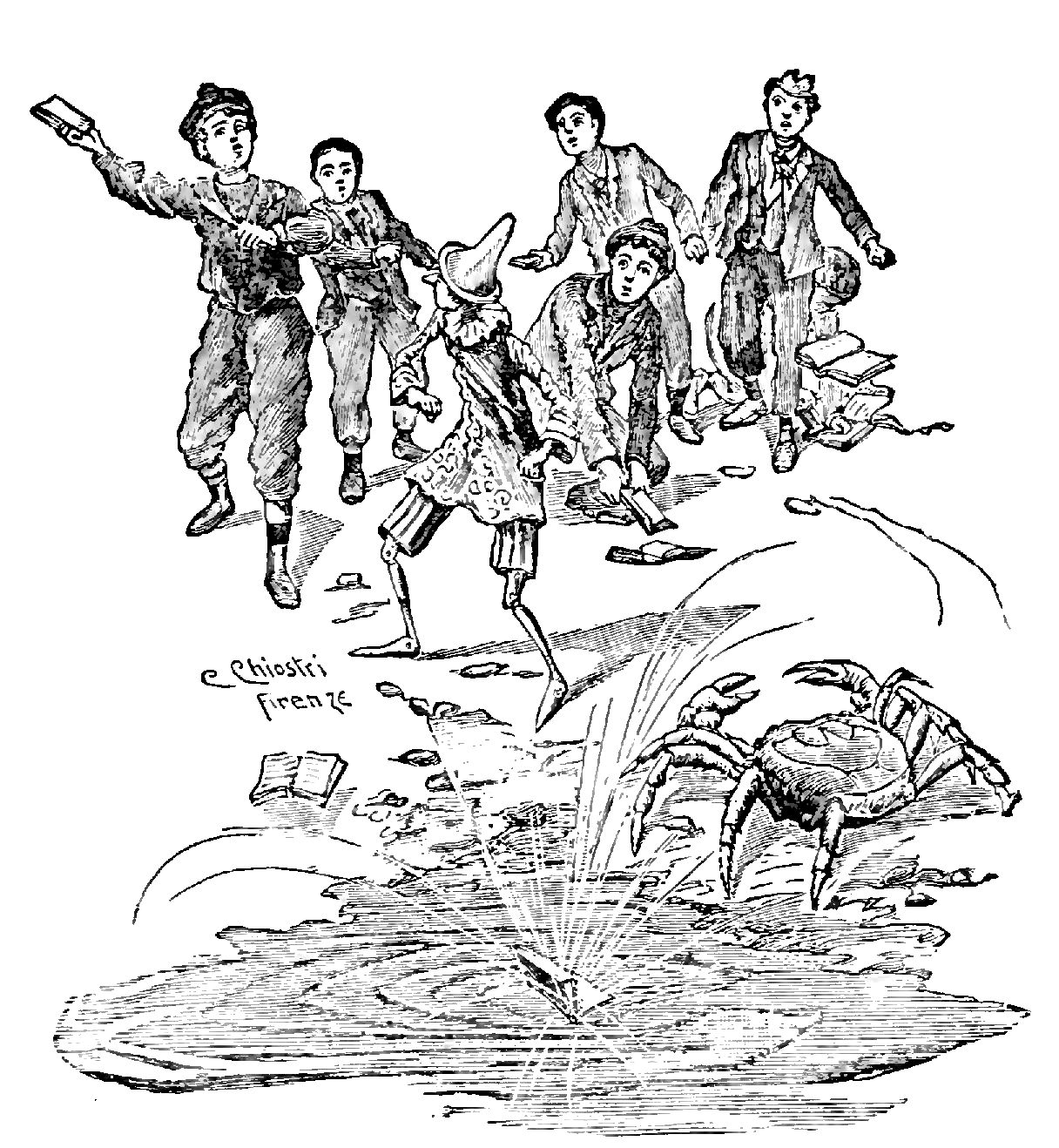 Illustrations from "Le avventure di Pinocchio, storia di un burattino", Carlo Collodi, Bemporad & figlio, Firenze 1902 (Drawings and engravings by Carlo Chiostri, and A. Bongini)